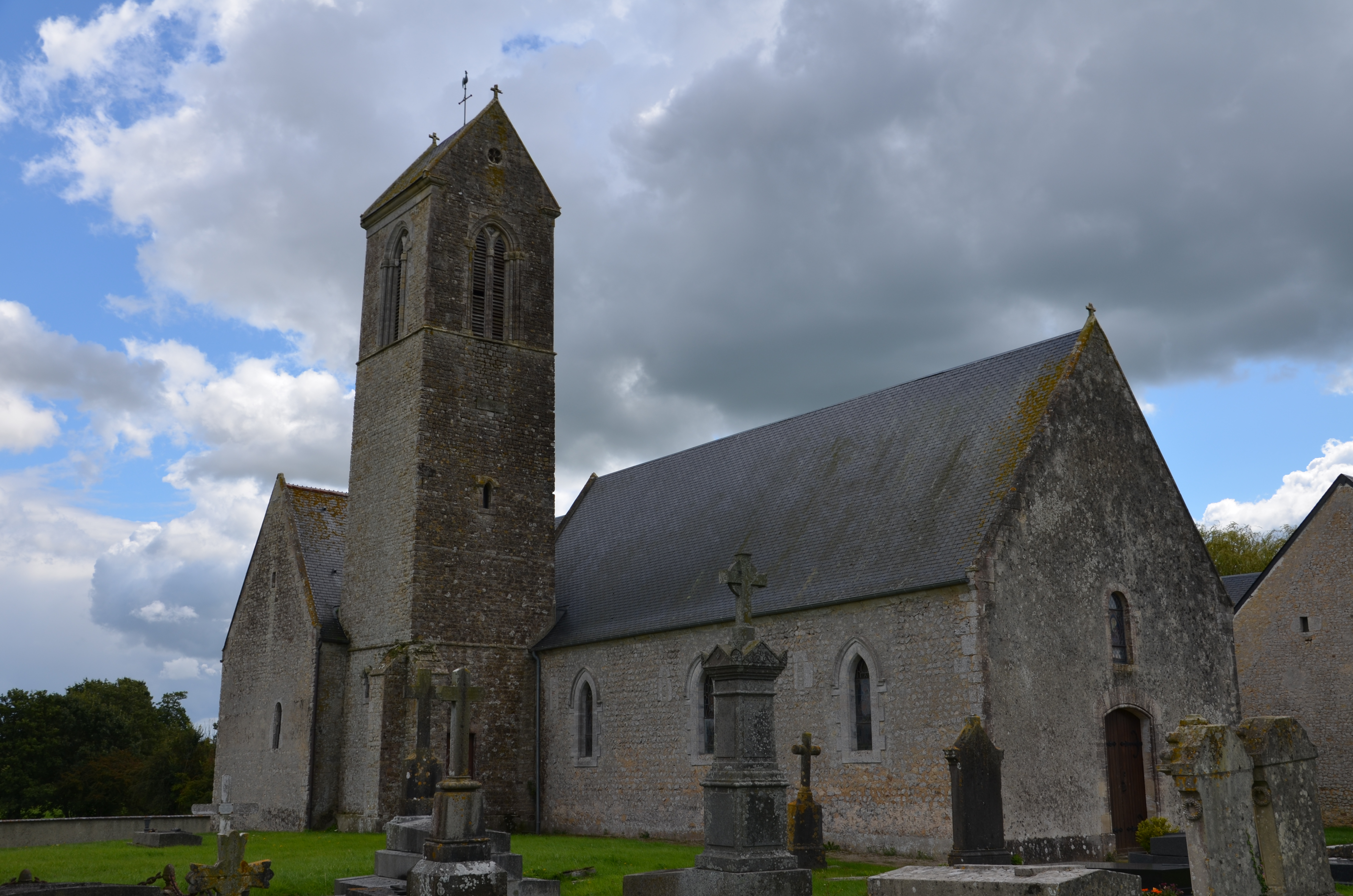 Église Saint-Aubin de Saon.